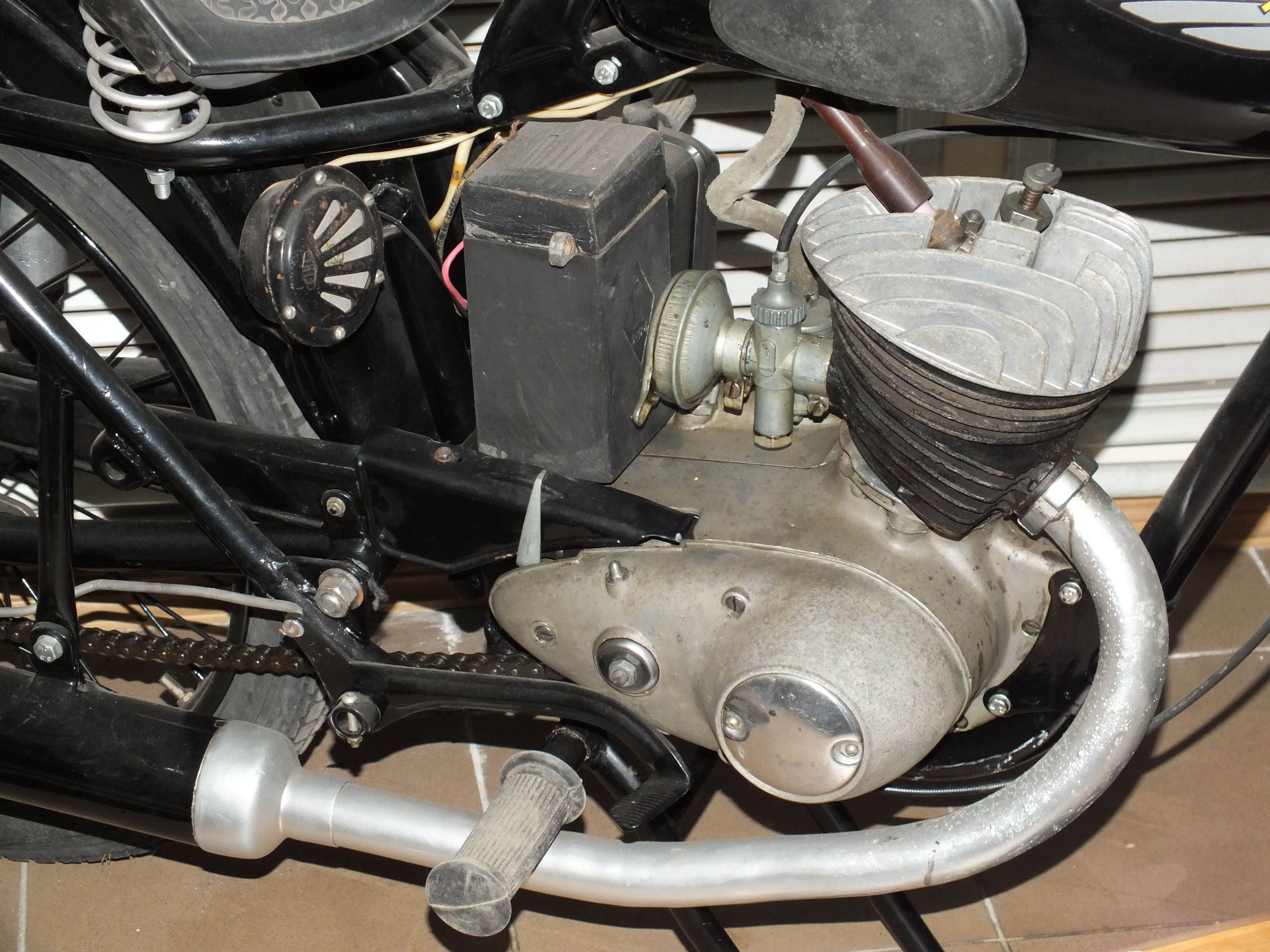 Мотоцикл К-55 во Владивостоке